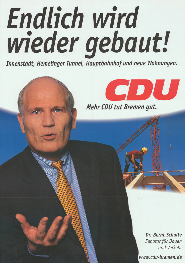 Endlich wird wieder gebaut! Innenstadt, Hemelinger Tunnel, Hauptnahnhof und neue Wohnungen. CDU Mehr CDU tut Bremen gut. Dr. Bernt Schulte Senator für Bauen und Verkehr Abbildung: Foto vor Baustelle Plakatart: Kandidaten-/Personenplakat mit Porträt Objekt-Signatur: 10-005 : 1003 Bestand: Plakate zu Bürgerschaftswahlen Bremen (10-005) GliederungBestand10-18: Plakate zu Bürgerschaftswahlen Bremen (10-005) » CDU Lizenz: KAS/ACDP 10-005 : 1003 CC-BY-SA 3.0 DE